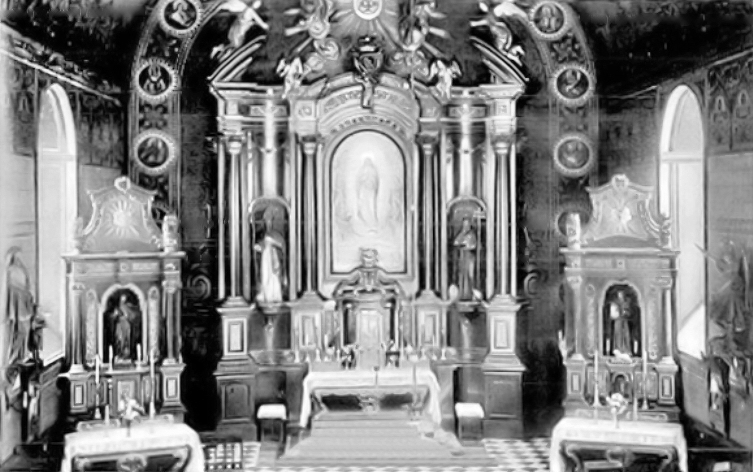 Innenansicht der 1913 abgerissenen Kirche des Essener Kapuzinerklosters